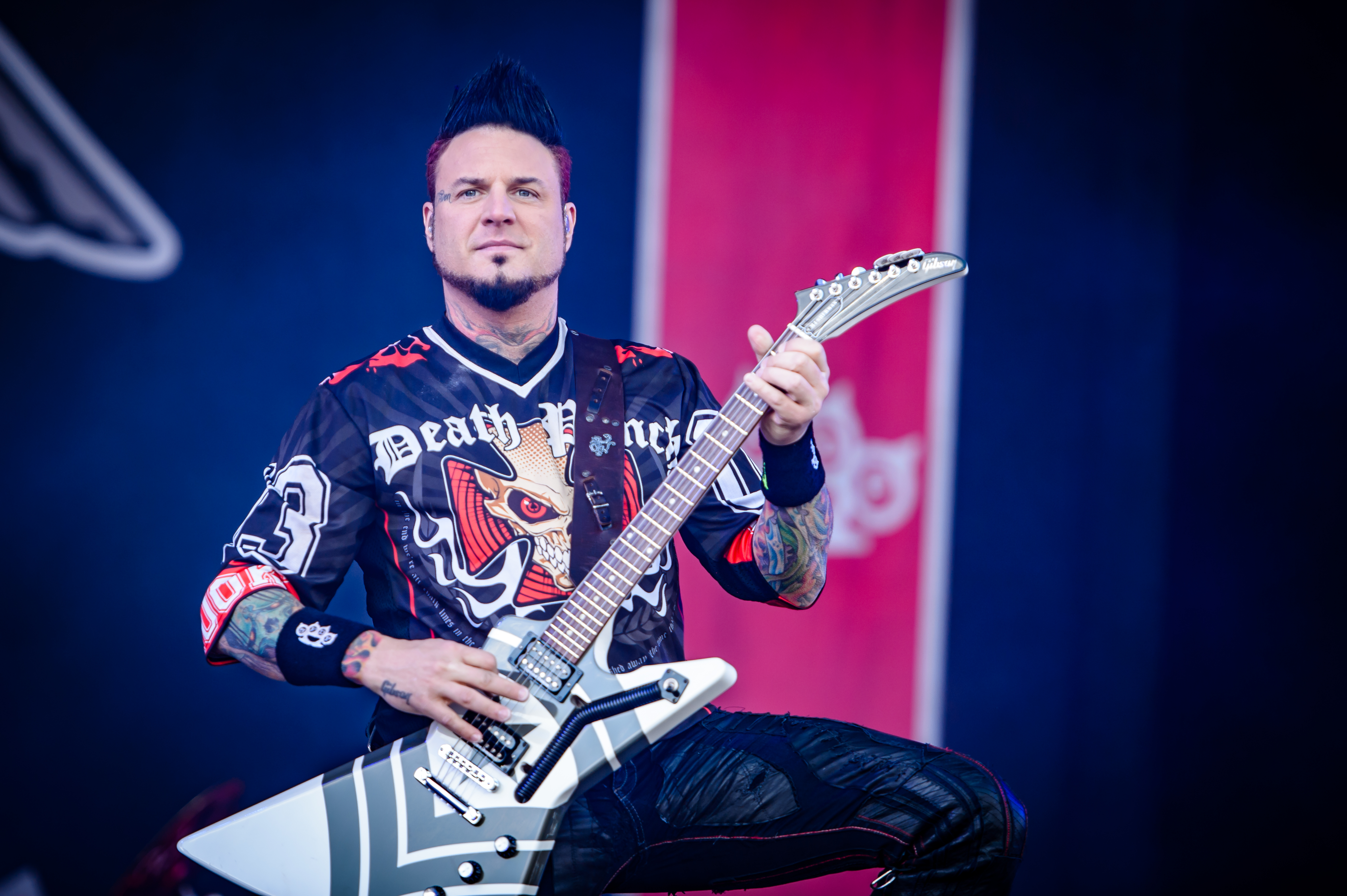 'Rock im Park 2017; Nürnberg': 'Five Finger Death Punch'